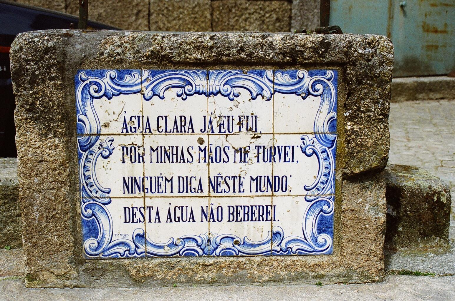 Fonte situada na cidade de Trancoso, com um azulejo tipico português, com versos sobre a Água. This file was uploaded for Wiki Loves Monuments in Portugal with the unique identifier 70648.